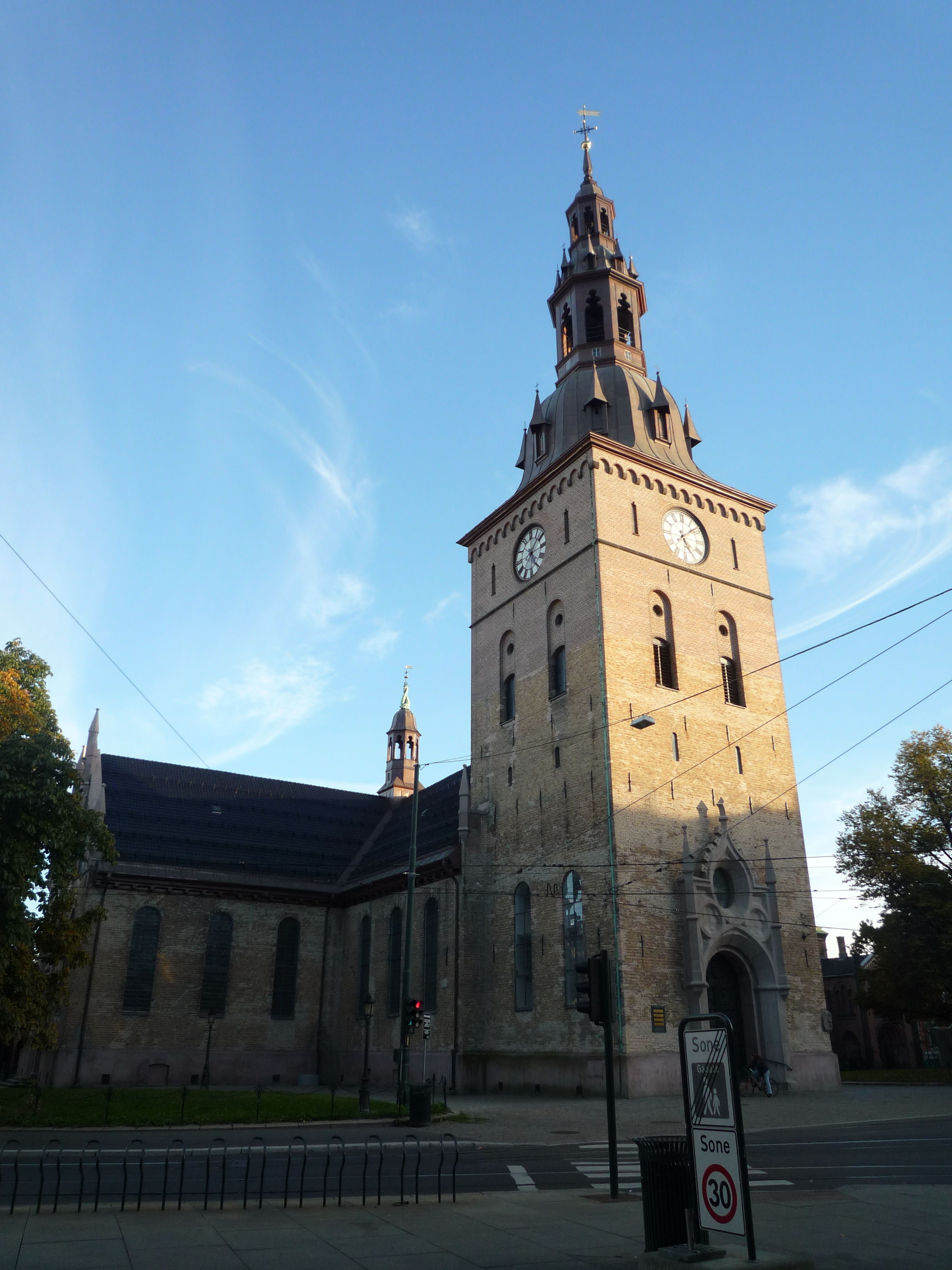 Кафедральный собор Осло